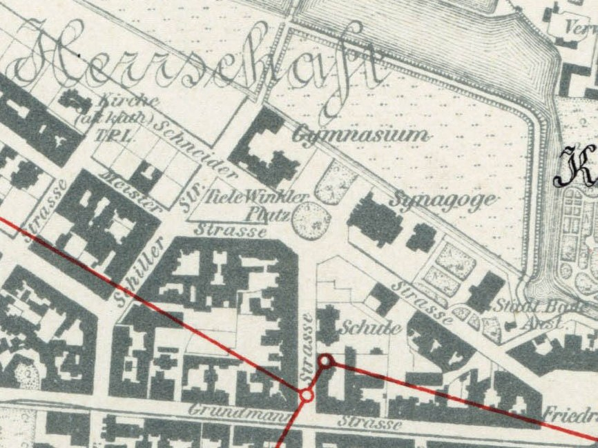 Fragment mapy Katowic z 1903